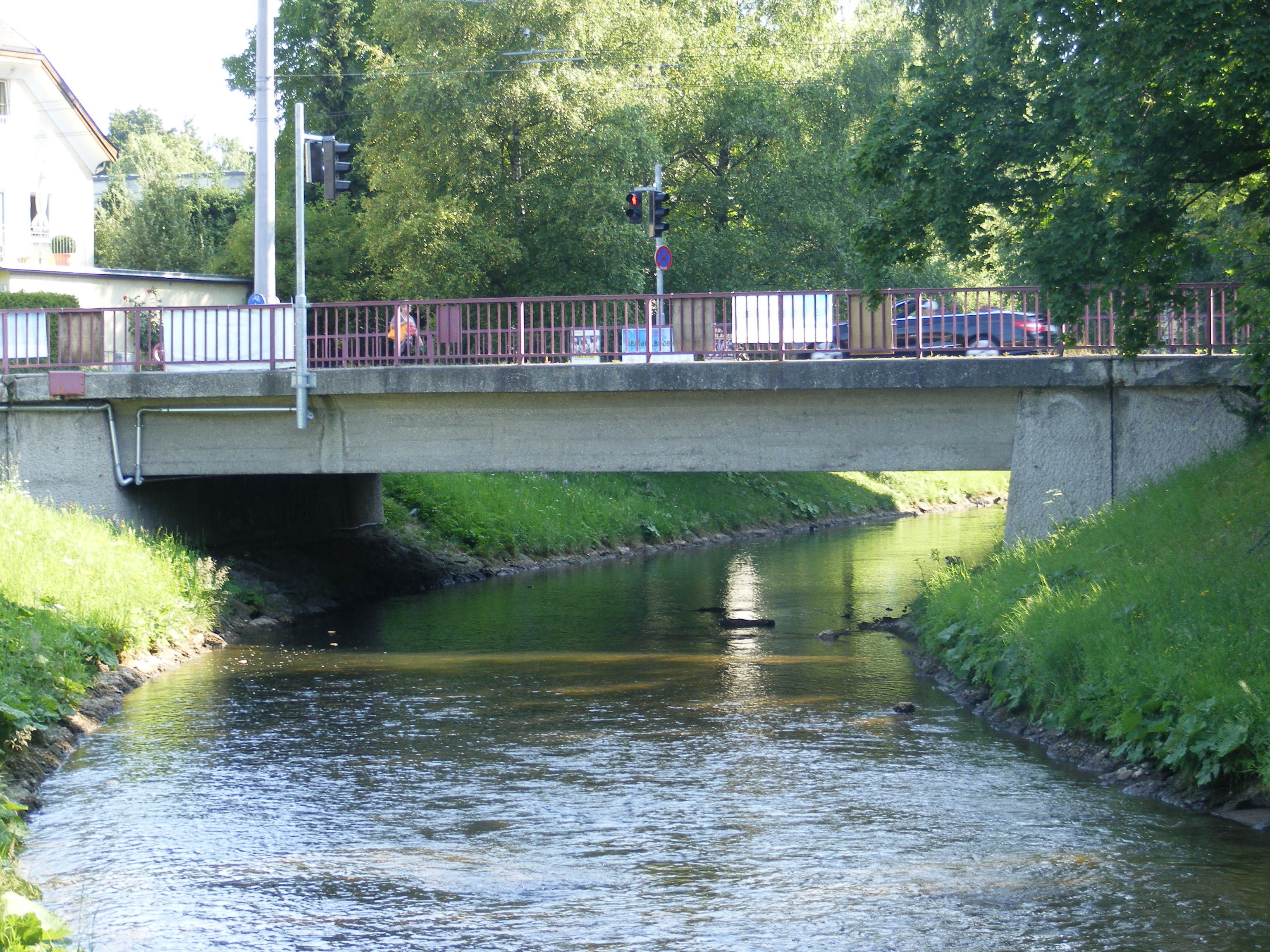 Der Name Glanbrücke wird in der Stadt Salzburg für eine 1961 neu errichtete Brücke über den Glanbach verwendet.